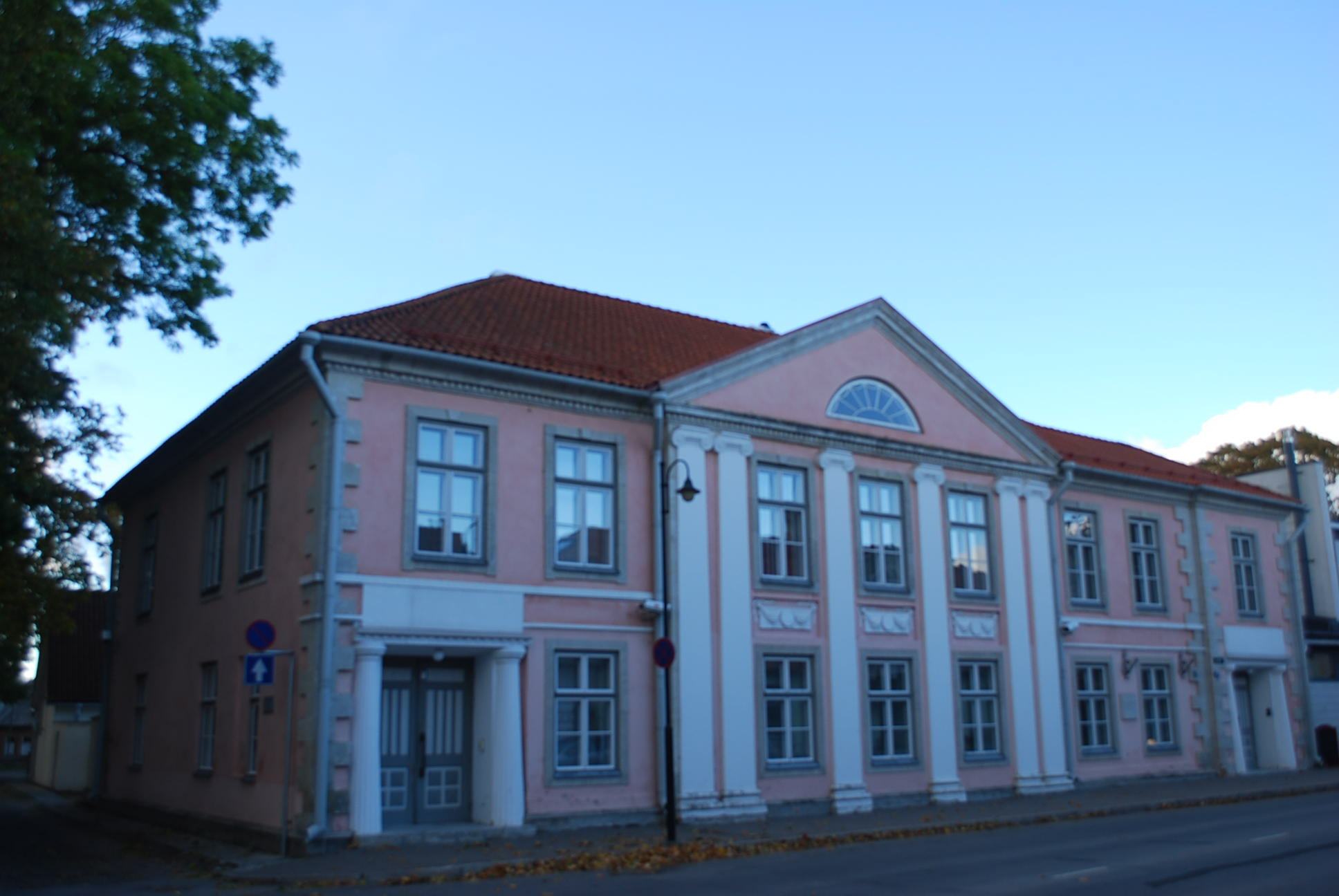 Elamu Kuressaare Lossi tn 6